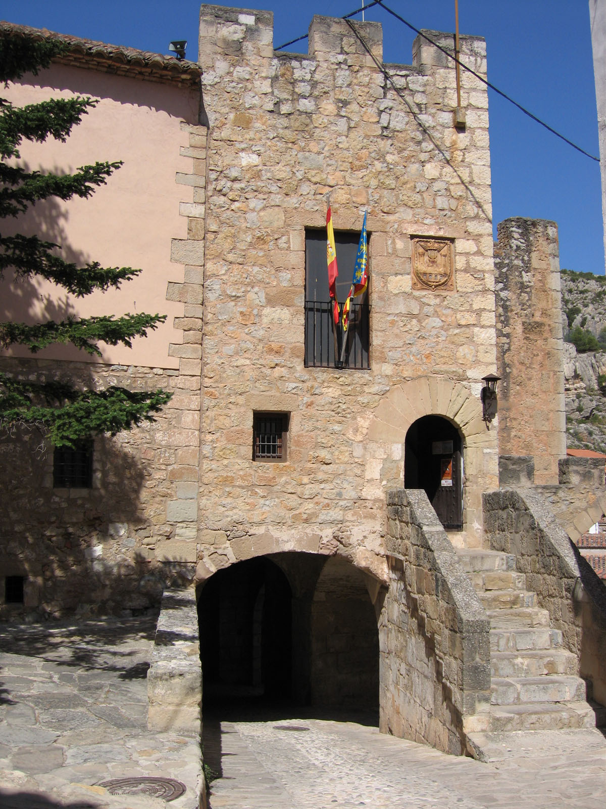 Entrada del Ayuntamiento de Alpuente. Se trata de una antigua aljama donde se reunía la Gobernación árabe.